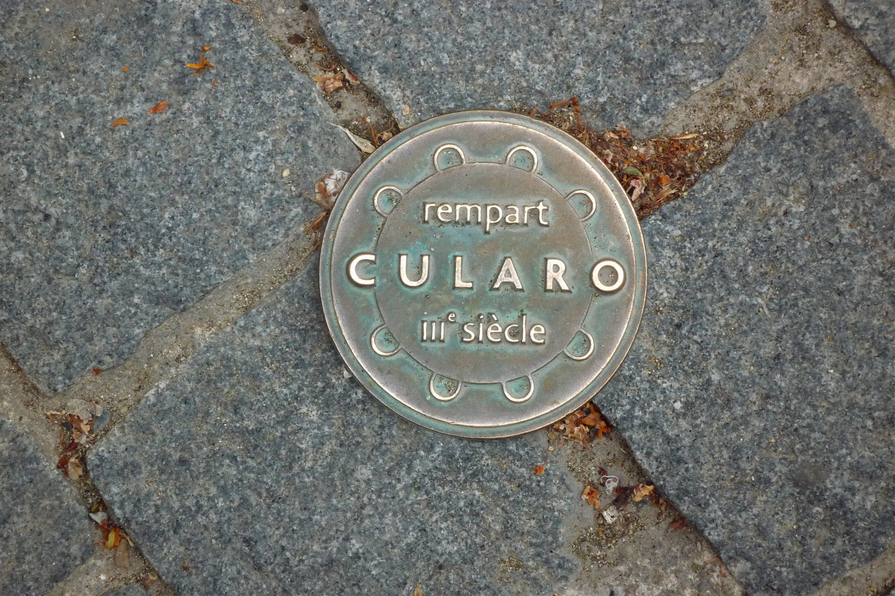 Pastille au sol représentant le cheminement de l'enceinte romaine de Grenoble (IIIe siècle).